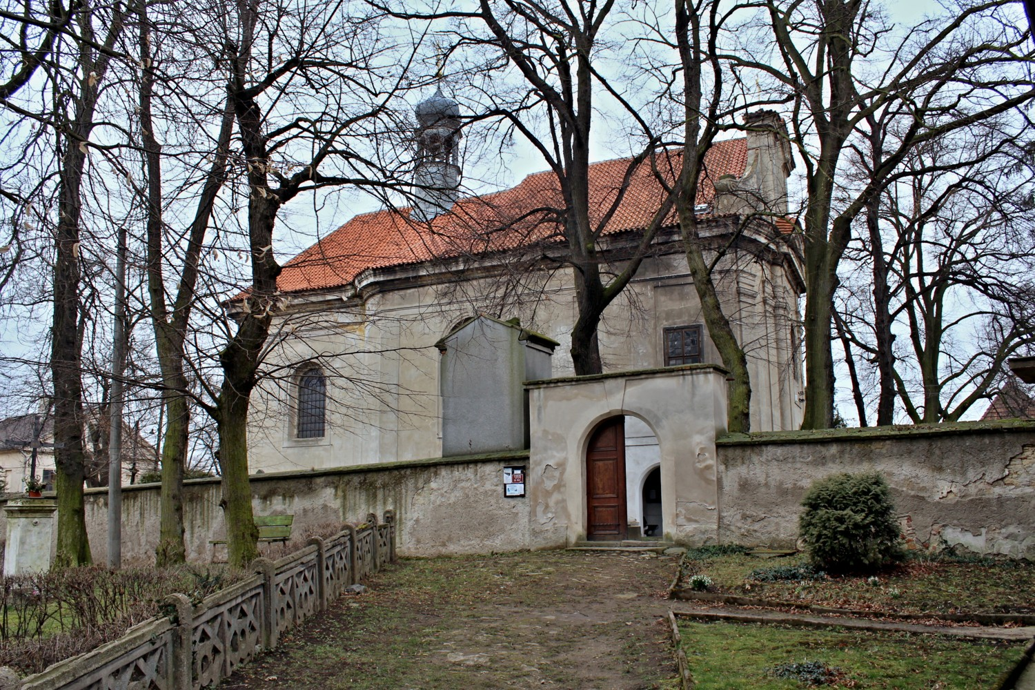 Svémyslice kostel sv. Prokopa